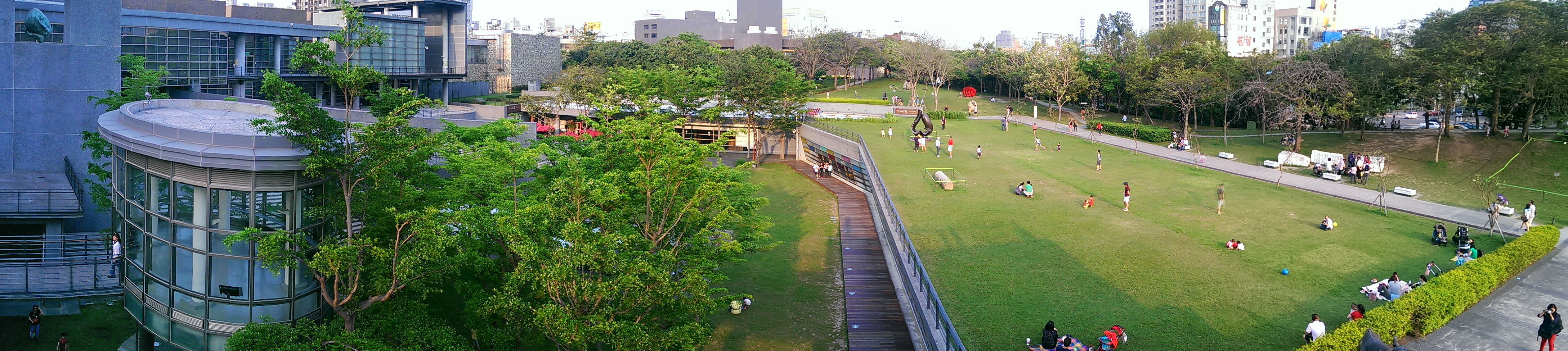 中文（台灣）: 國立台灣美術館雕塑園區全景